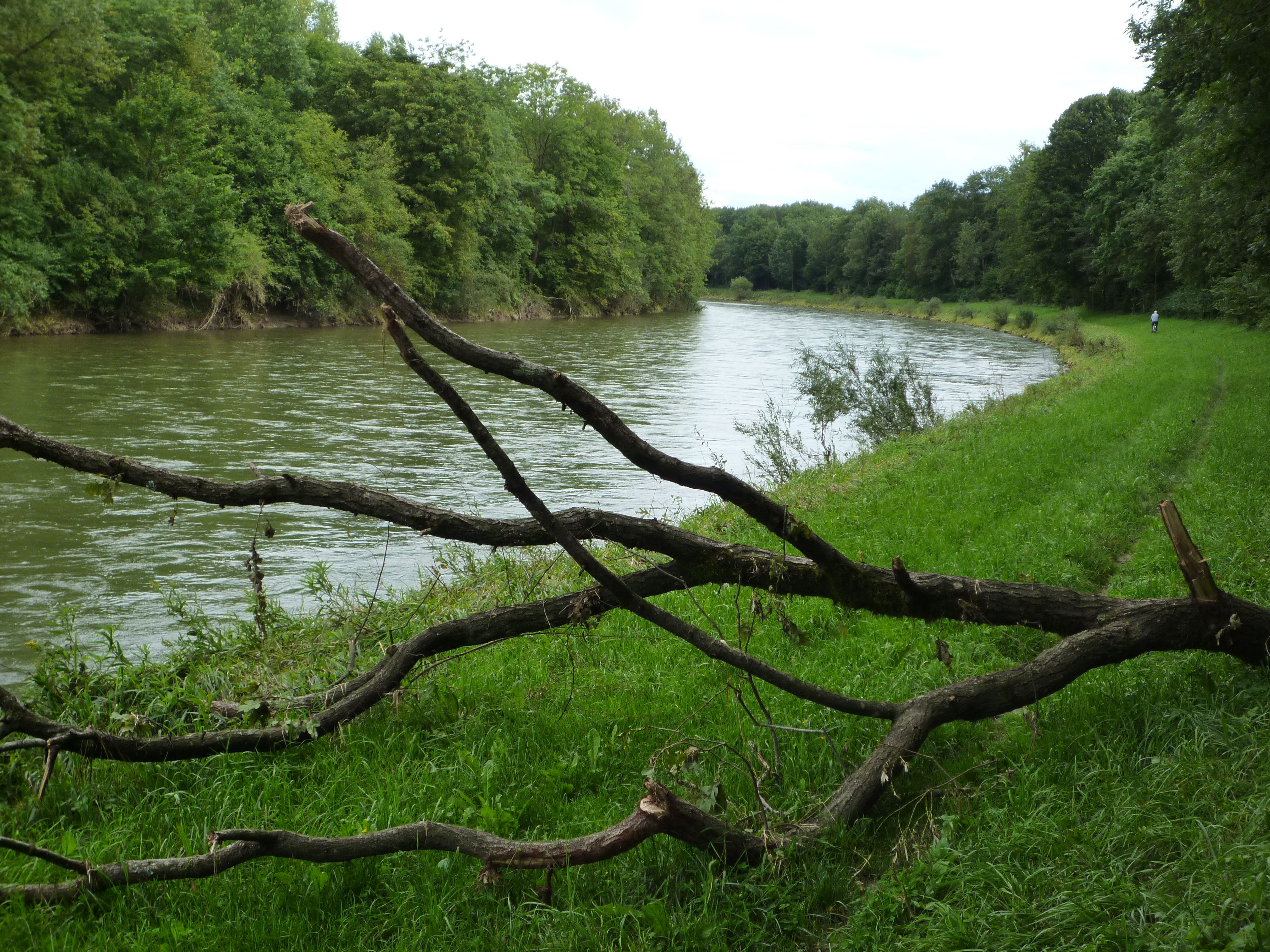 Ulm -Iller aufwärts vor der Mündung, Windbruch